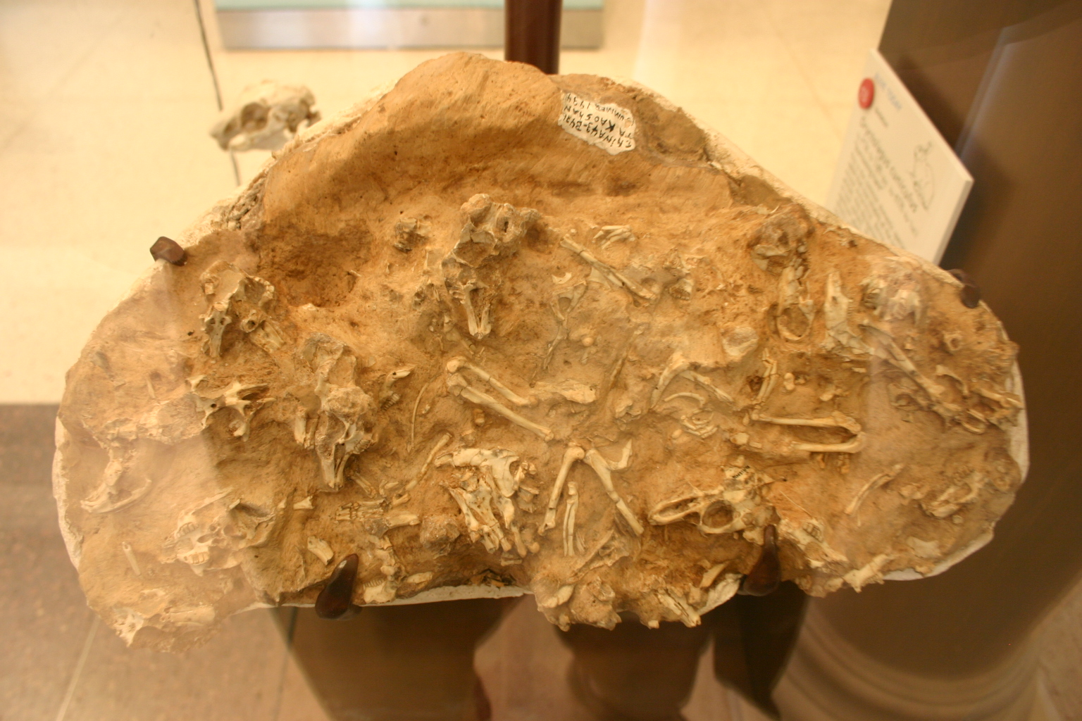 Fossil Ochotona specimen